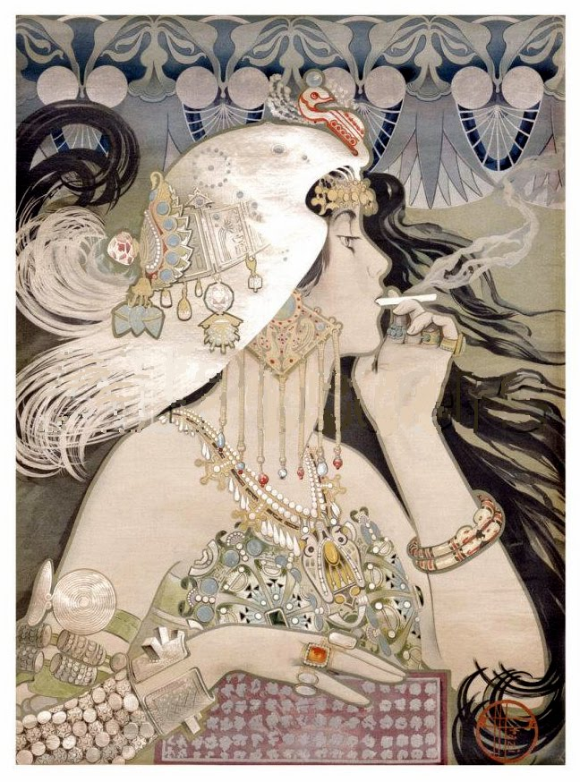 An advertisement for Job cigarette paper